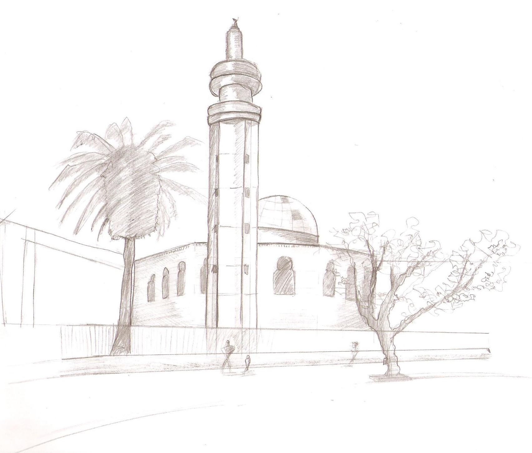 Minarete